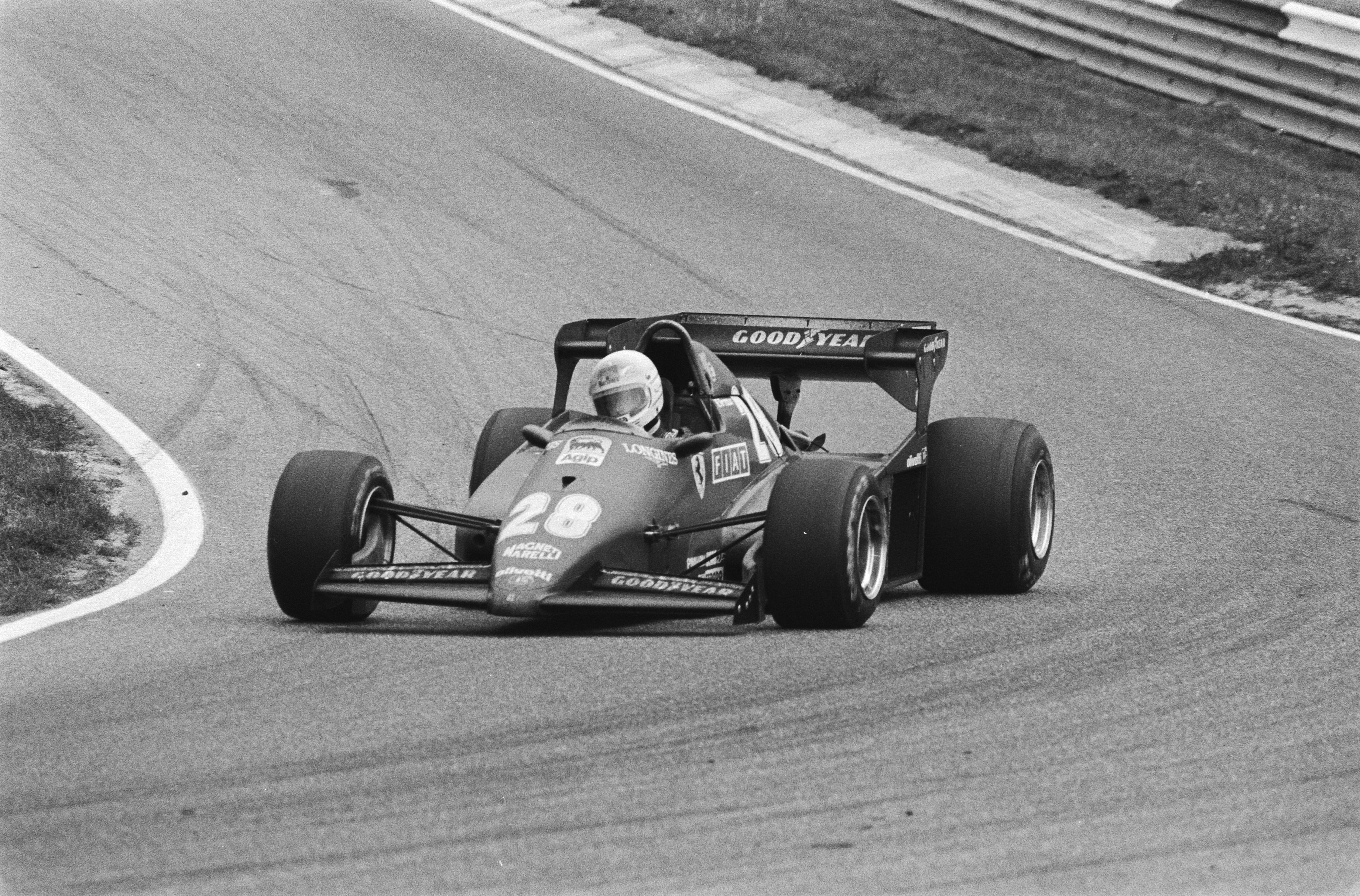 Winnaar René Arnoux in actie in een Ferrari.